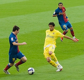 Lionel Messi & Dani Alves vs Villareal